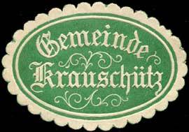 Sealing stamp Title: Gemeinde Krauschütz Description: grün, weiß, geprägt Place: Krauschütz size: 3x4 cm